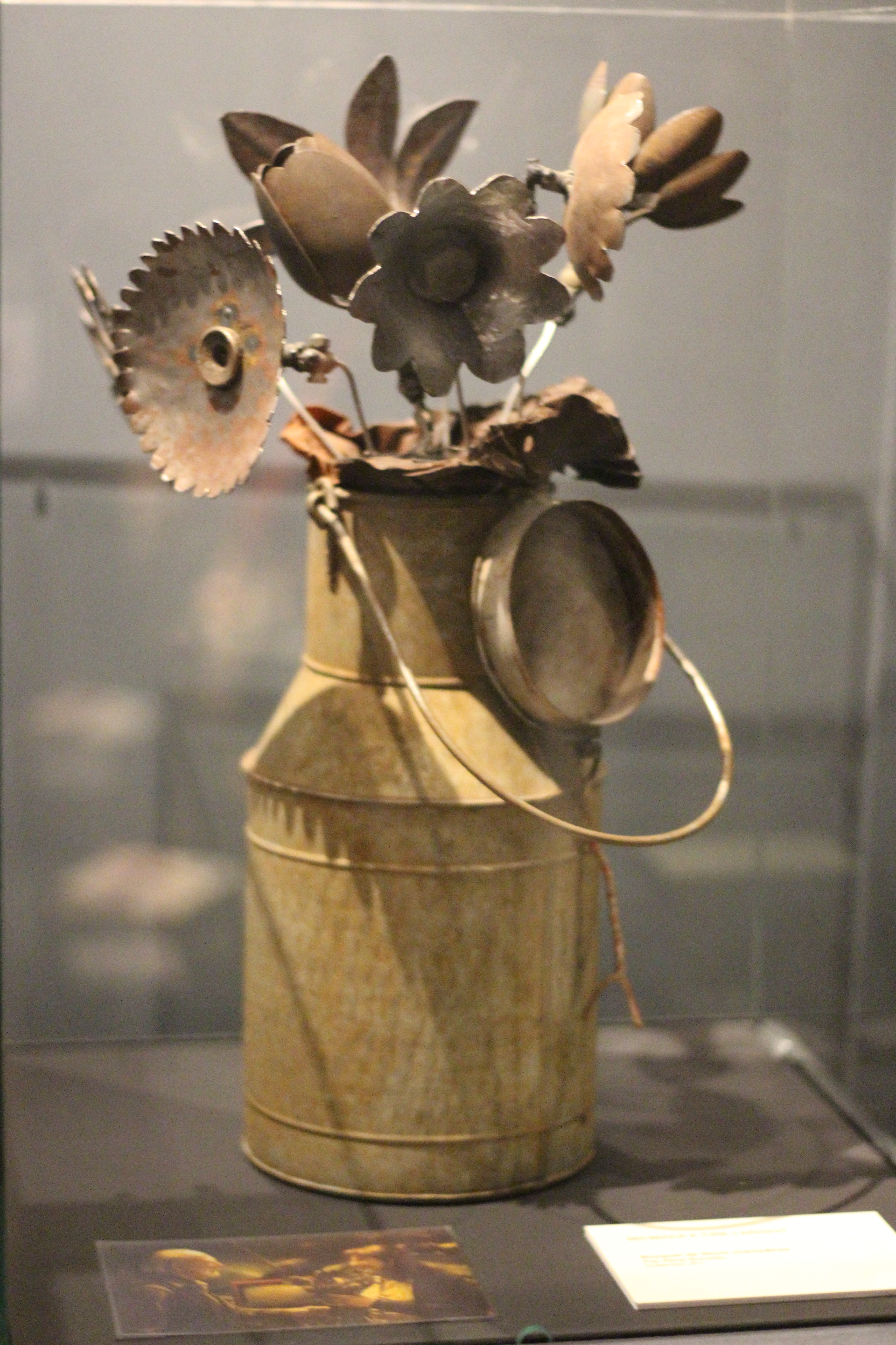 Accessoire du film Micmacs à tire-larigot. Exposition "Caro/Jeunet" au musée Minature et Cinéma en 2018-2019.